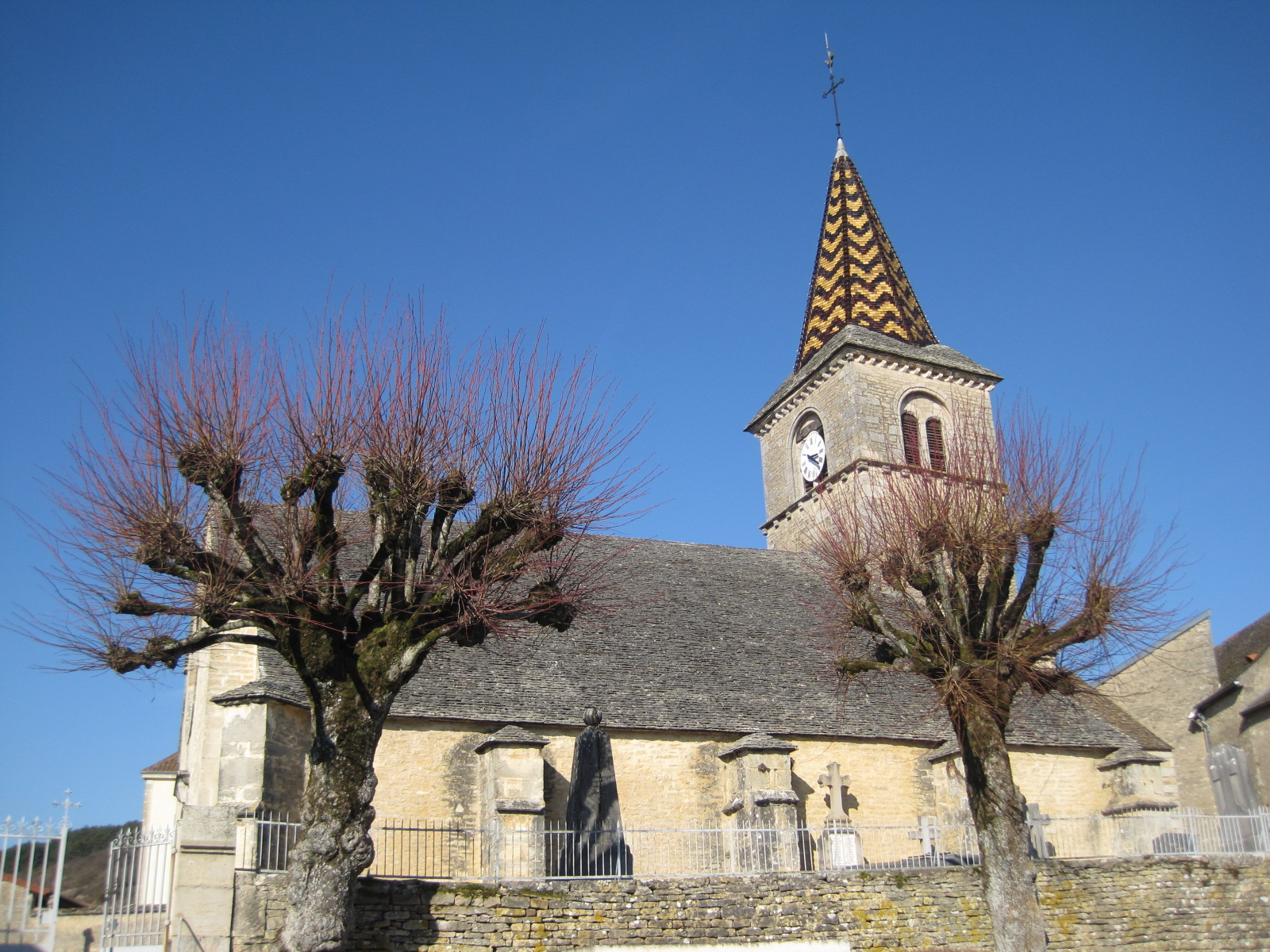 Eglise de Monthelie